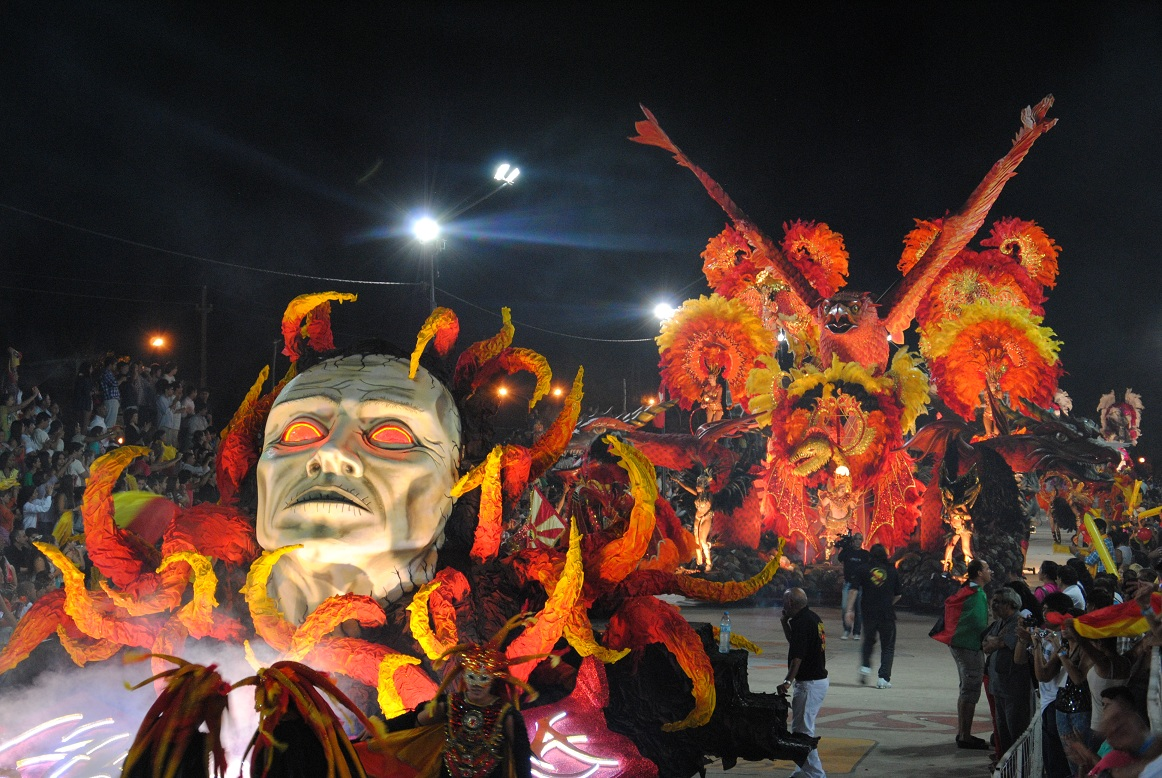 Abre alas y Frente de Comparsa de Carun Berá 2013